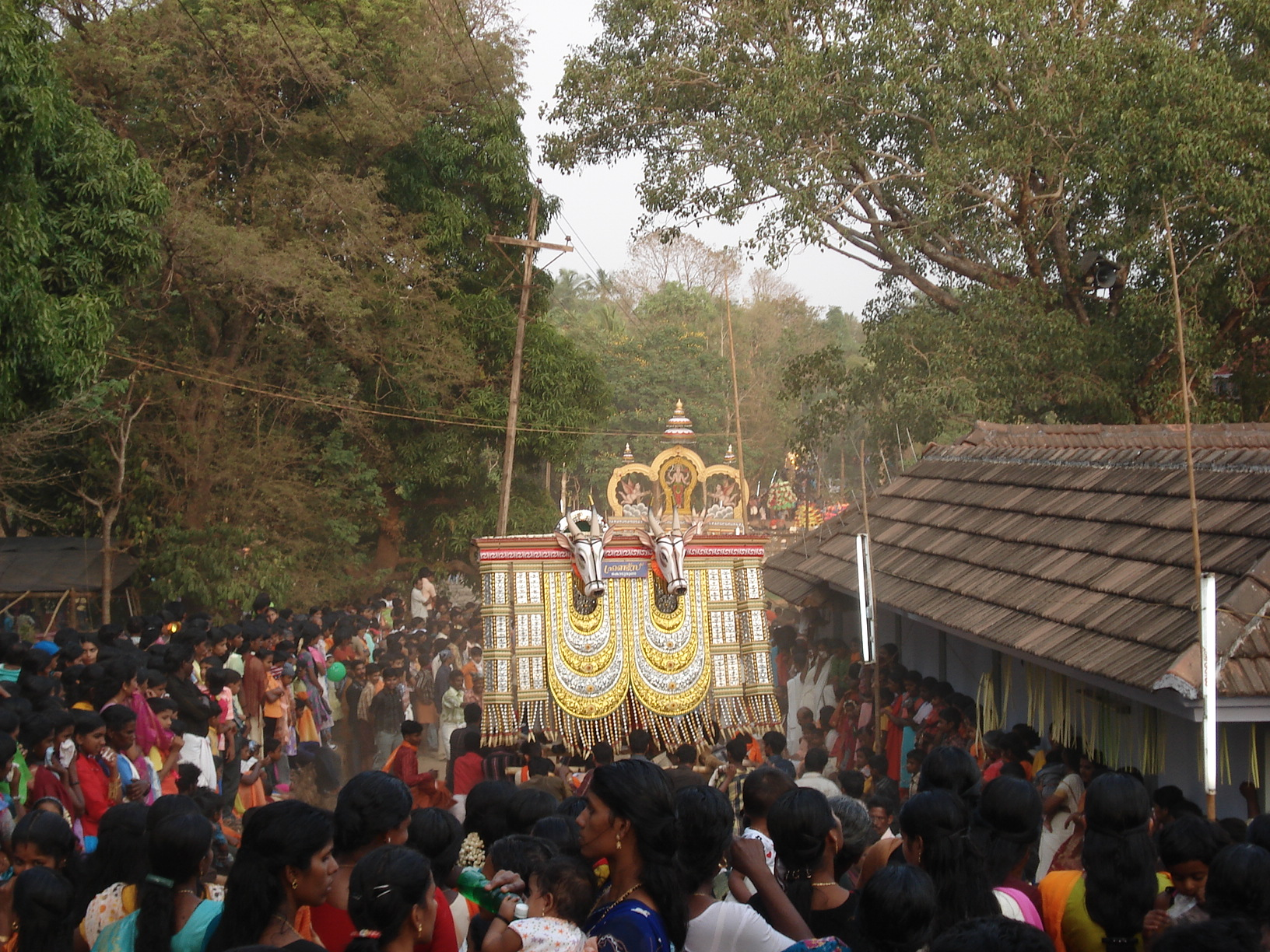 “Kalavela”, Chirankara Pooram, Pallippuram